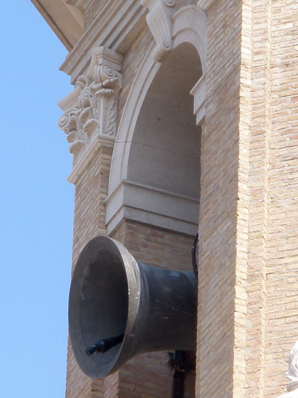 Iglesia de Santa Máría la Mayor, Épila (Zaragoza). Las campanas, repicando a Misa Mayor el Domingo de Ramos de 2012